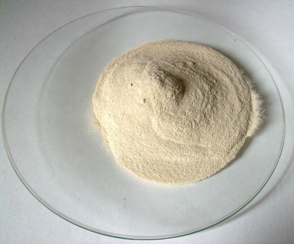 CaC2